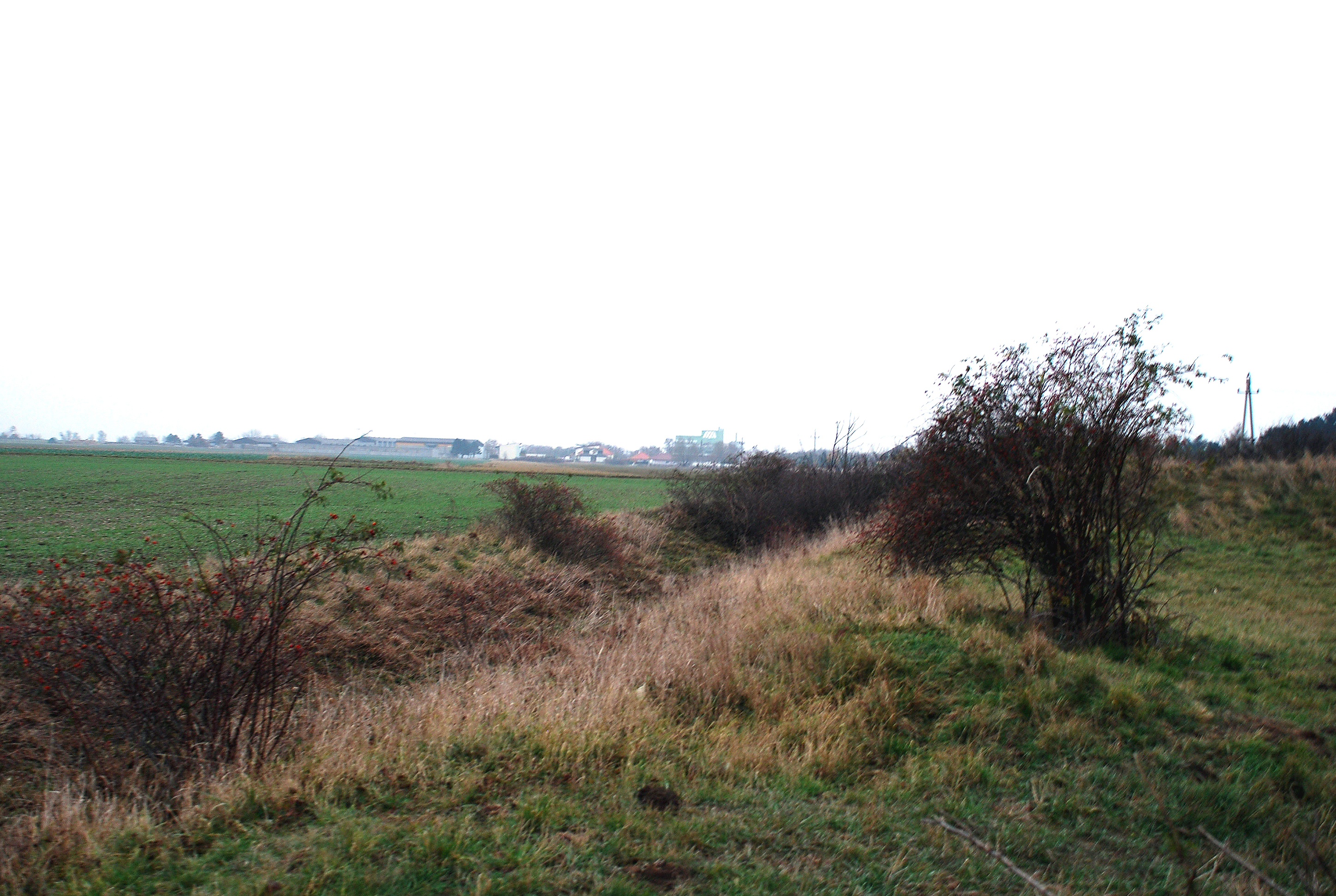 Kuruzzenschanze bei Parndorf, Burgenland, Österreich; auch als Kuruzenschanze, Alte Schanze, Kuruzenwall oder ähnlich bezeichnet, eine Befestigungsanlage aus dem beginnenden 18. Jahrhundert Object location48° 01′ 21.85″ N, 16° 51′ 59.73″ E